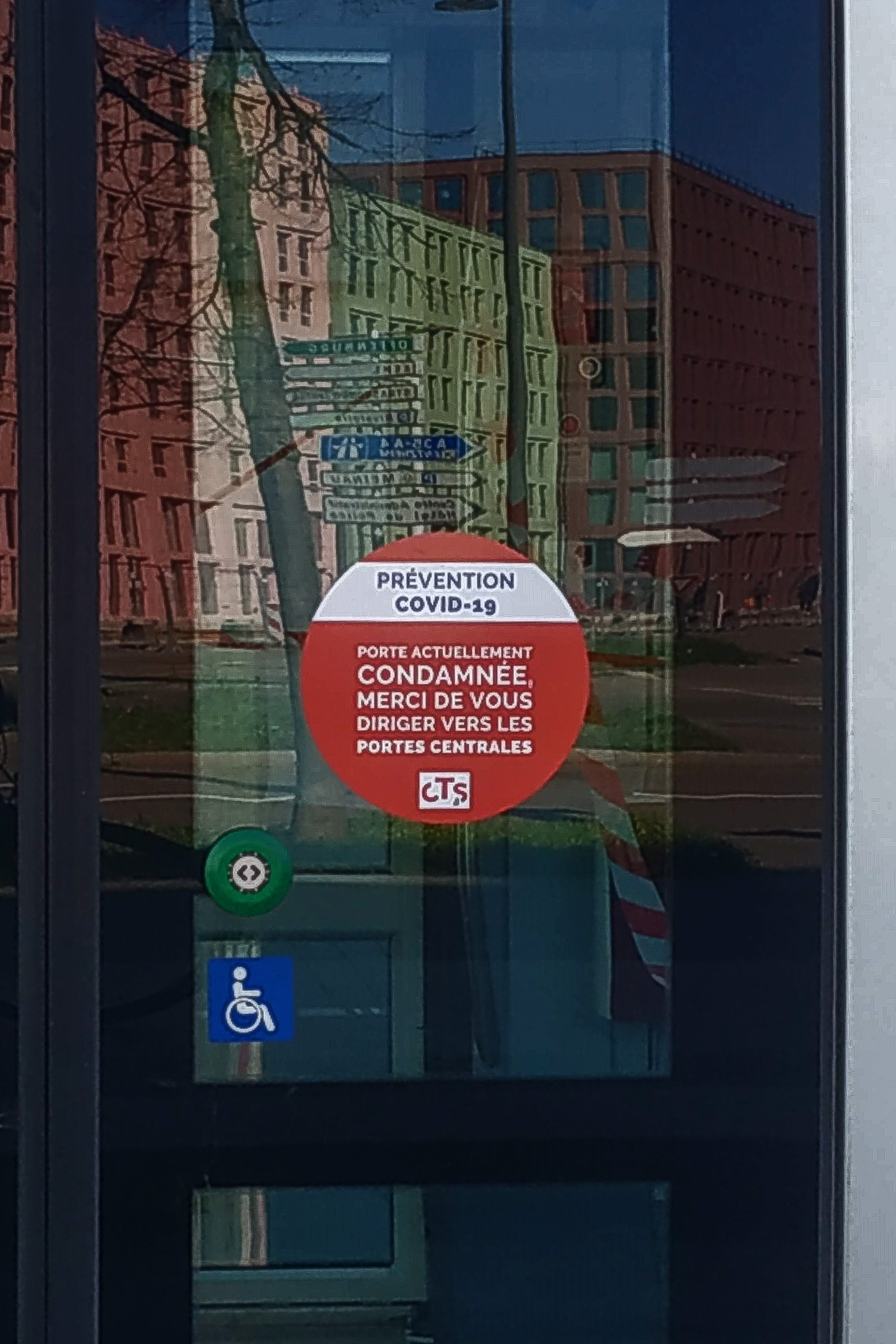 La CTS a décidé de condamner les accès des portes à proximité des extrémités des rames et donc des cabines de conduite pour limiter la contamination des conducteurs. Un message spécifique a été affiché quelques semaines après le début du confinement.